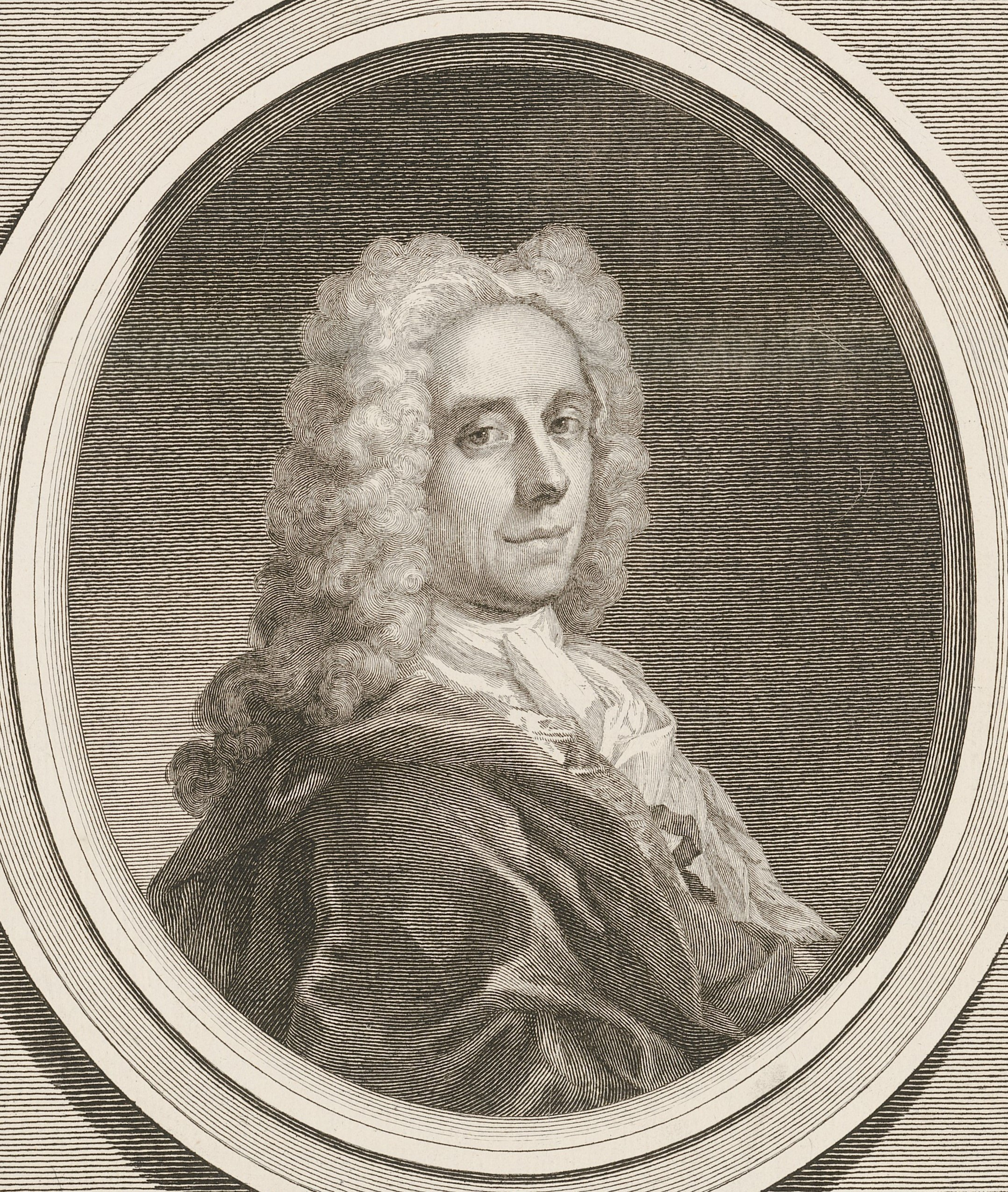 Giovanni Antonio Faldoni (1689 - um 1770), Radierer; nach Rosalba Carriera (1675 - 1757): Porträt von Marco Ricci, 1724, Kupferstich und Radierung, Inventar-Nr. 2014.0287 (ETH Zürich).